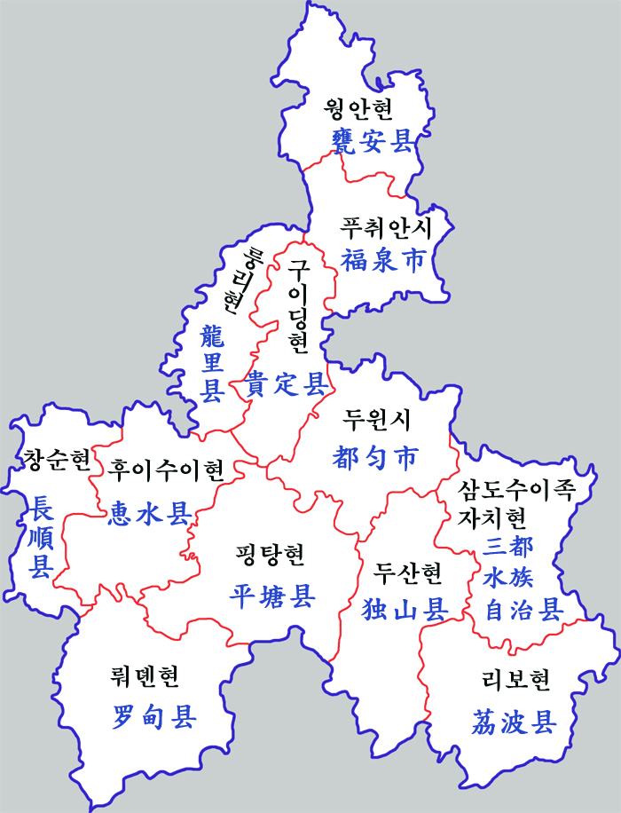 첸난자지주 현급구역도